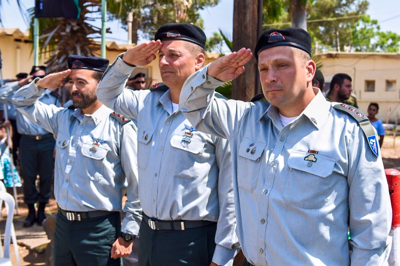 טקס חילופי מפקד עוצבת סער מגולן (חטיבה 7). אלוף-משנה דן נוימן מחליף את אלוף-משנה נדב לוטן, שכיהן בתפקיד זה במהלך השנתיים שקדמו. מימין: אל"ם נדב לוטן מח"ט 7 היוצא, תא"ל איציק תורג'מן מפקד עוצבת געש, אל"ם דן נוימן המח"ט הנכנס.